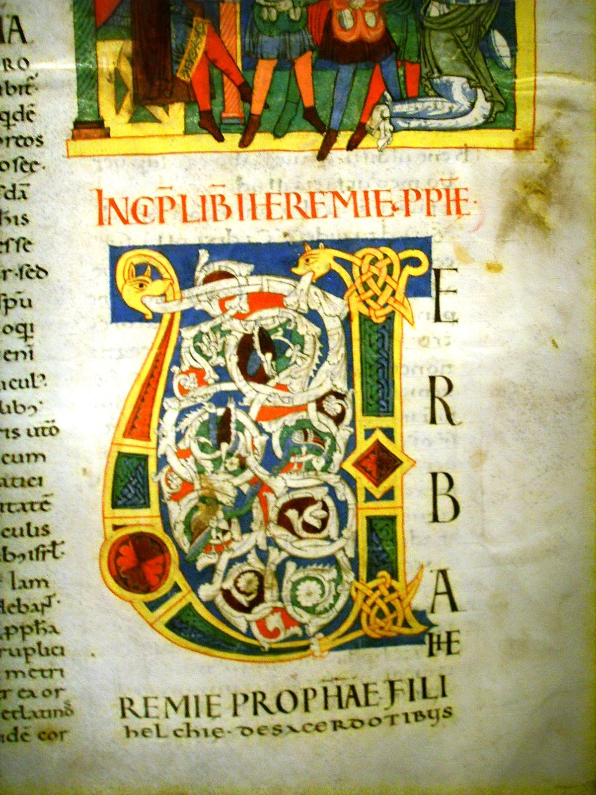 Toscana xii secolo, bibbia di santa maria del fiore